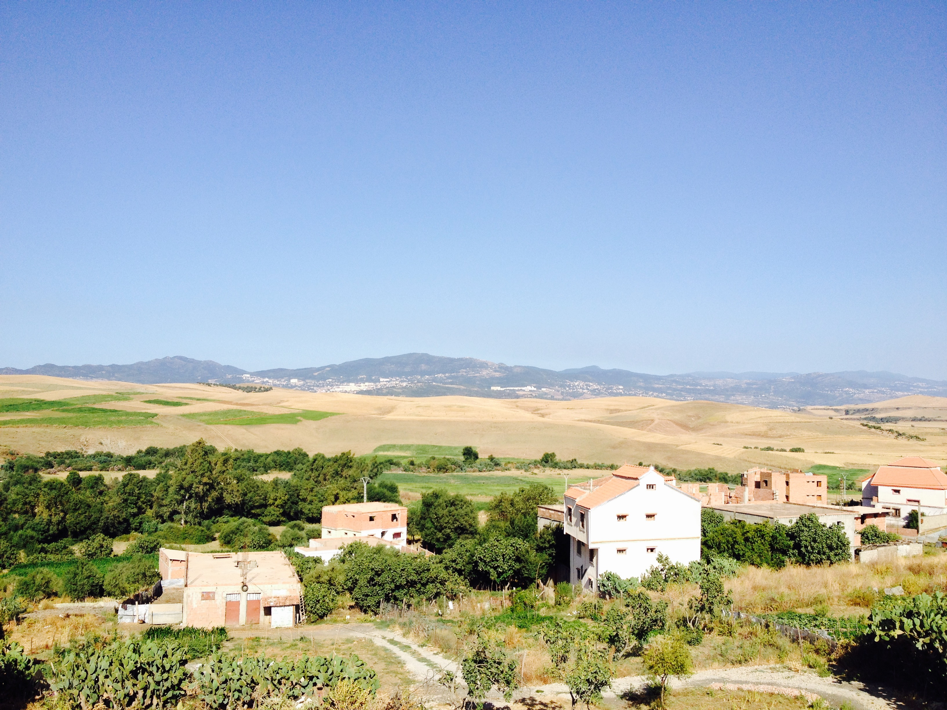 village